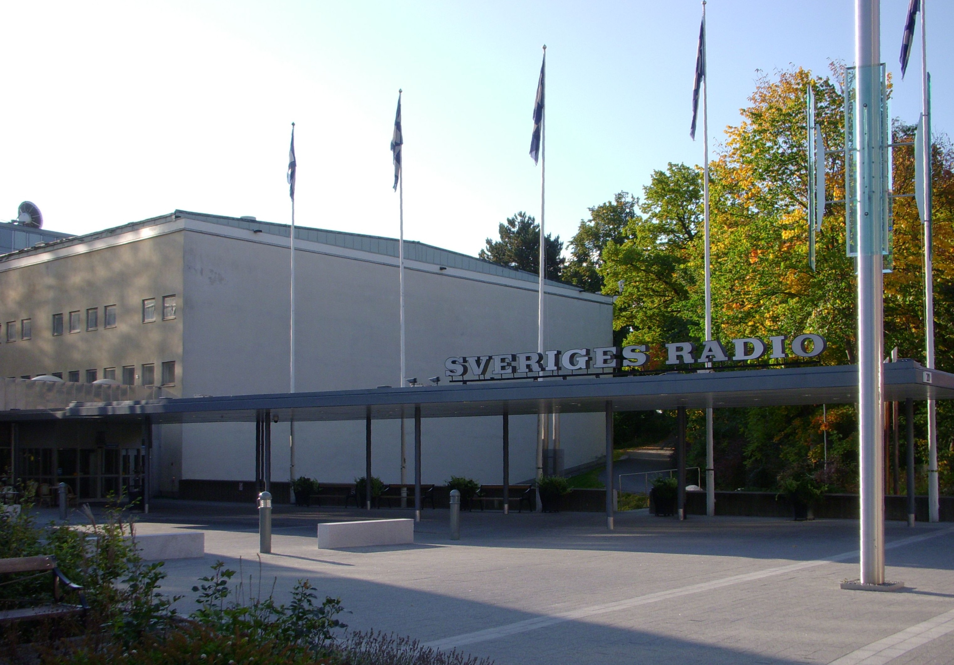 Sveriges Radio, byggnad i Stockholm